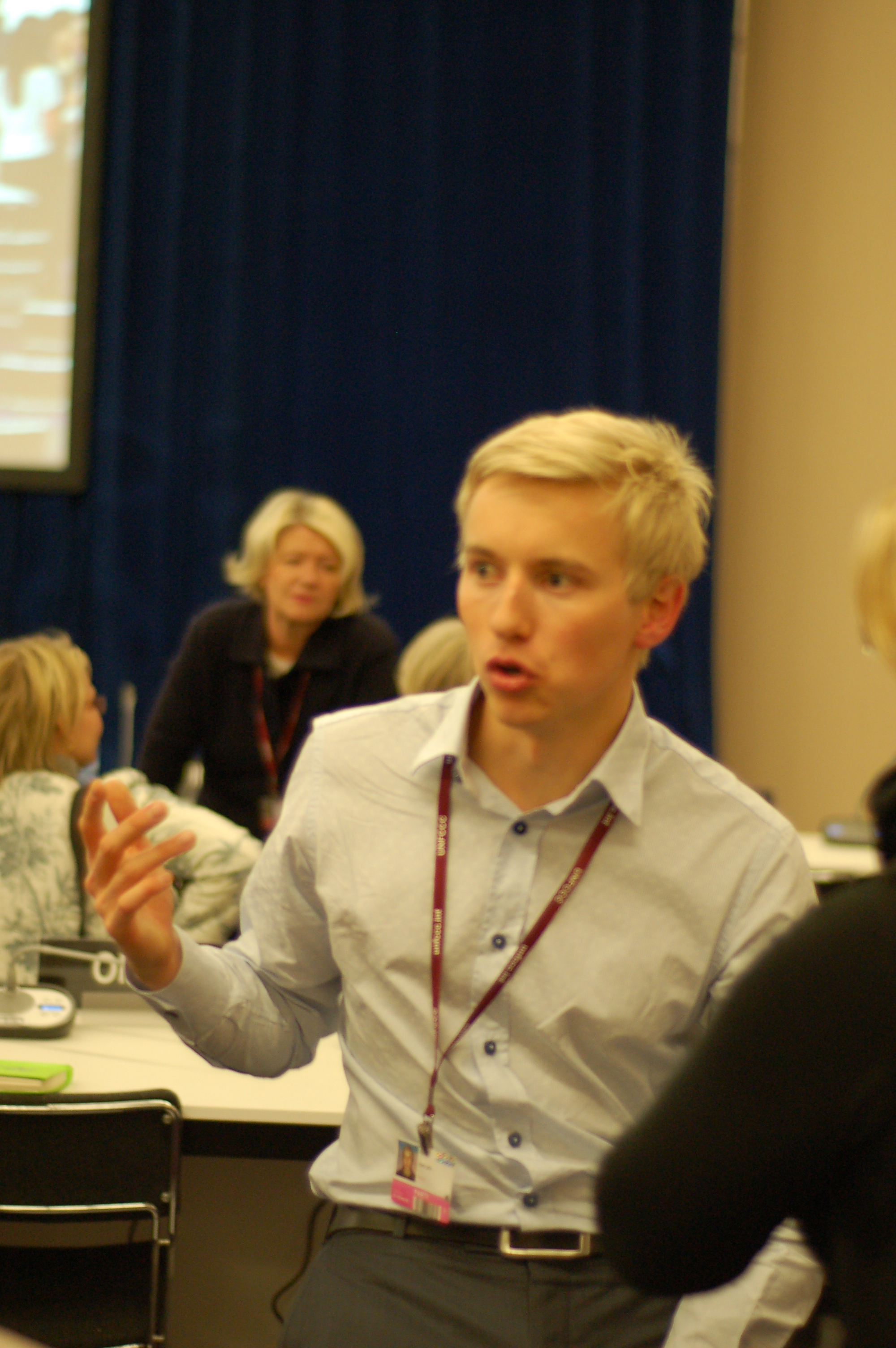 Bård Lahn på klimaforhandlinger i Barcelona